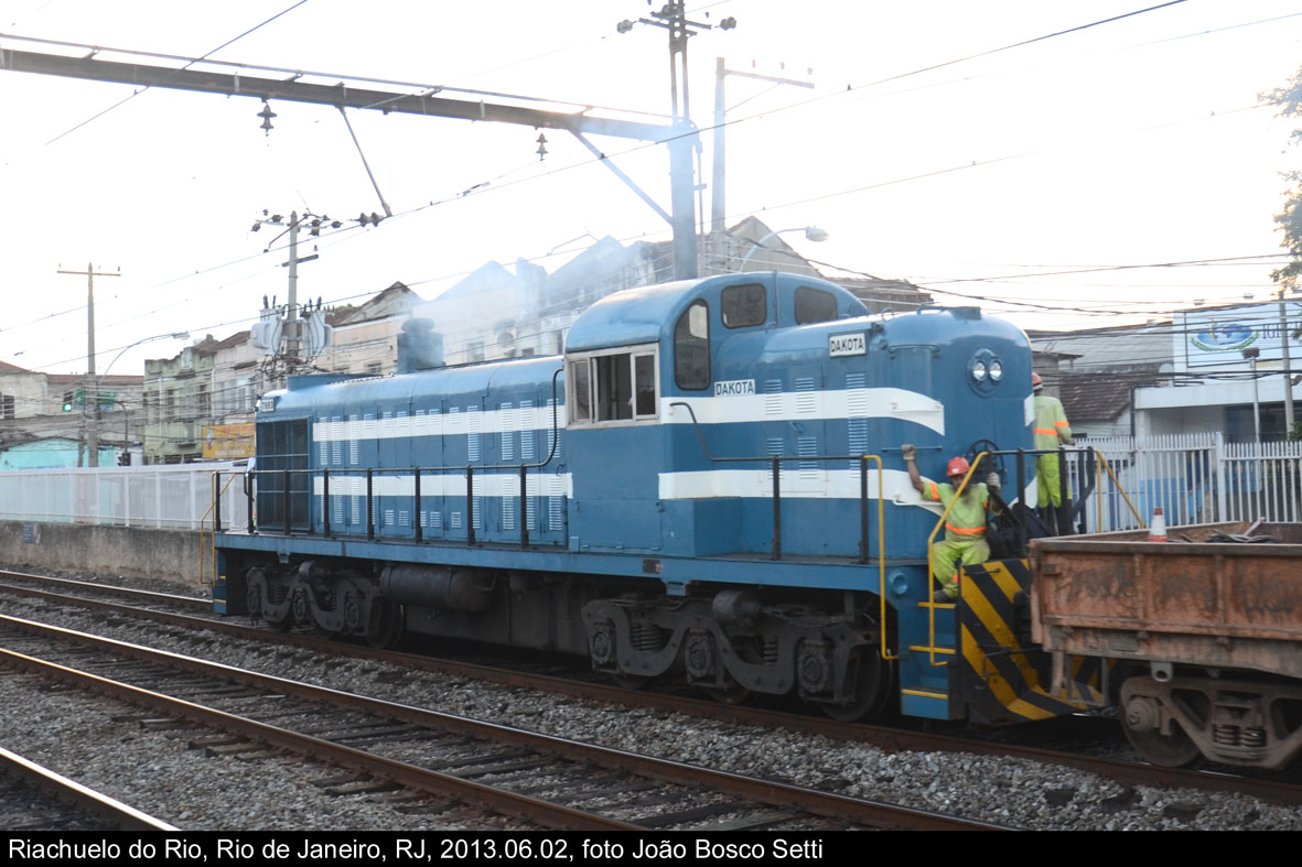 ALCO RSC-3 7653 IRON, originalmente operou na CPEF, posteriormente FEPASA, CIMINAS e SPA Engenharia. Atualmente operando locada pela IRON a Supervia, cidade do Rio de Janeiro-RJ, Estação Riachuelo. Autoria de João Bosco Setti.